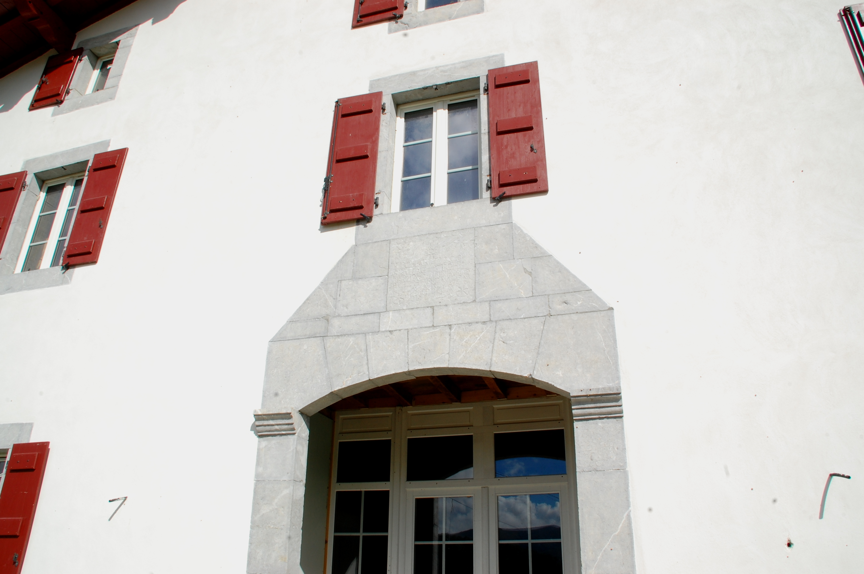 Façade de maison. Texte écrit : 'Etcharteco semiac etche berria eguin 1855 etche hundaco familia jaincoak benefica dezala' (Maison neuve construite par le fils d'Etcharté en 1855 afin que Dieu protège la famille de cette maison).